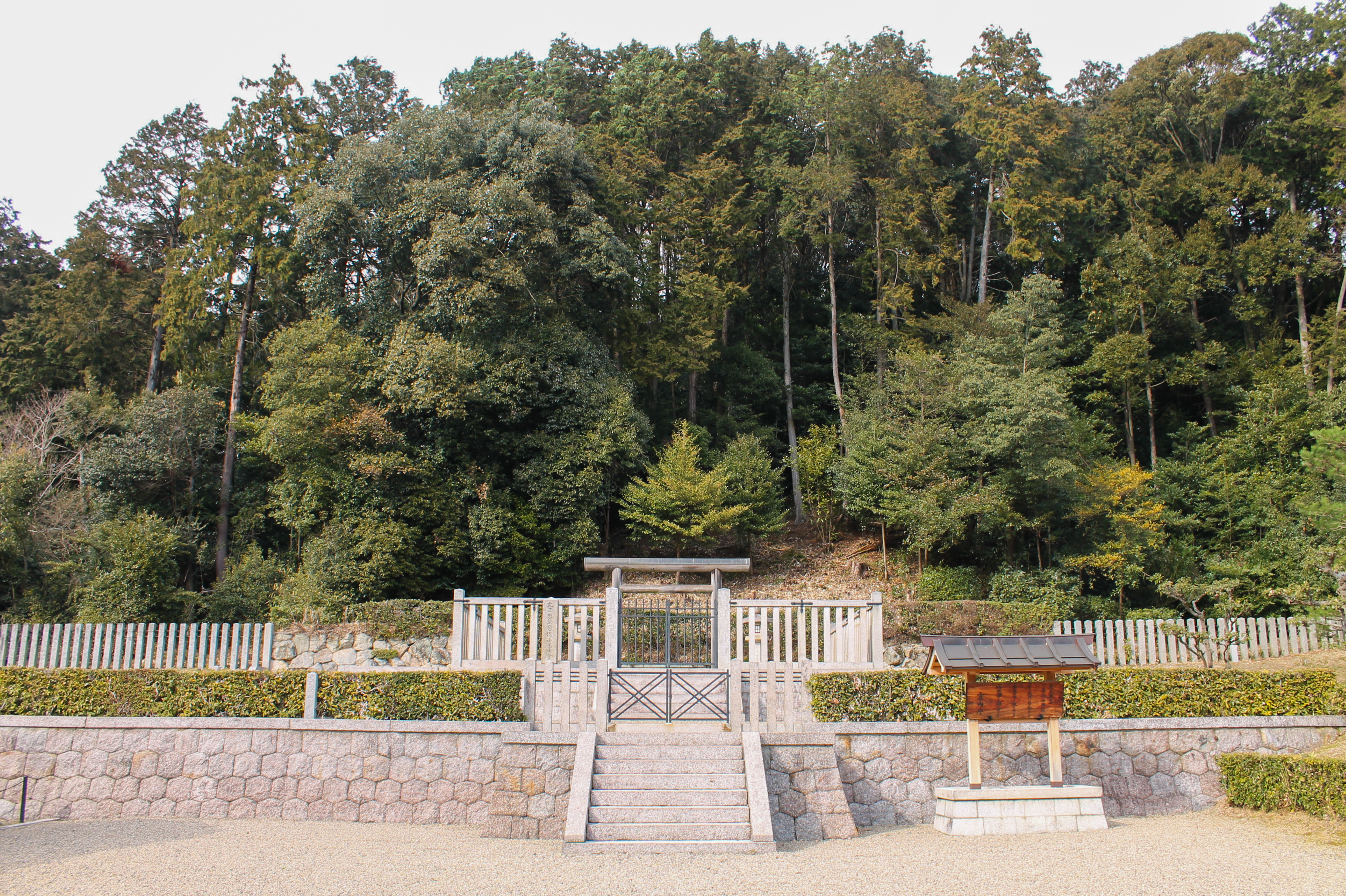 元正天皇陵に治定されている奈保山東陵を南側から撮影